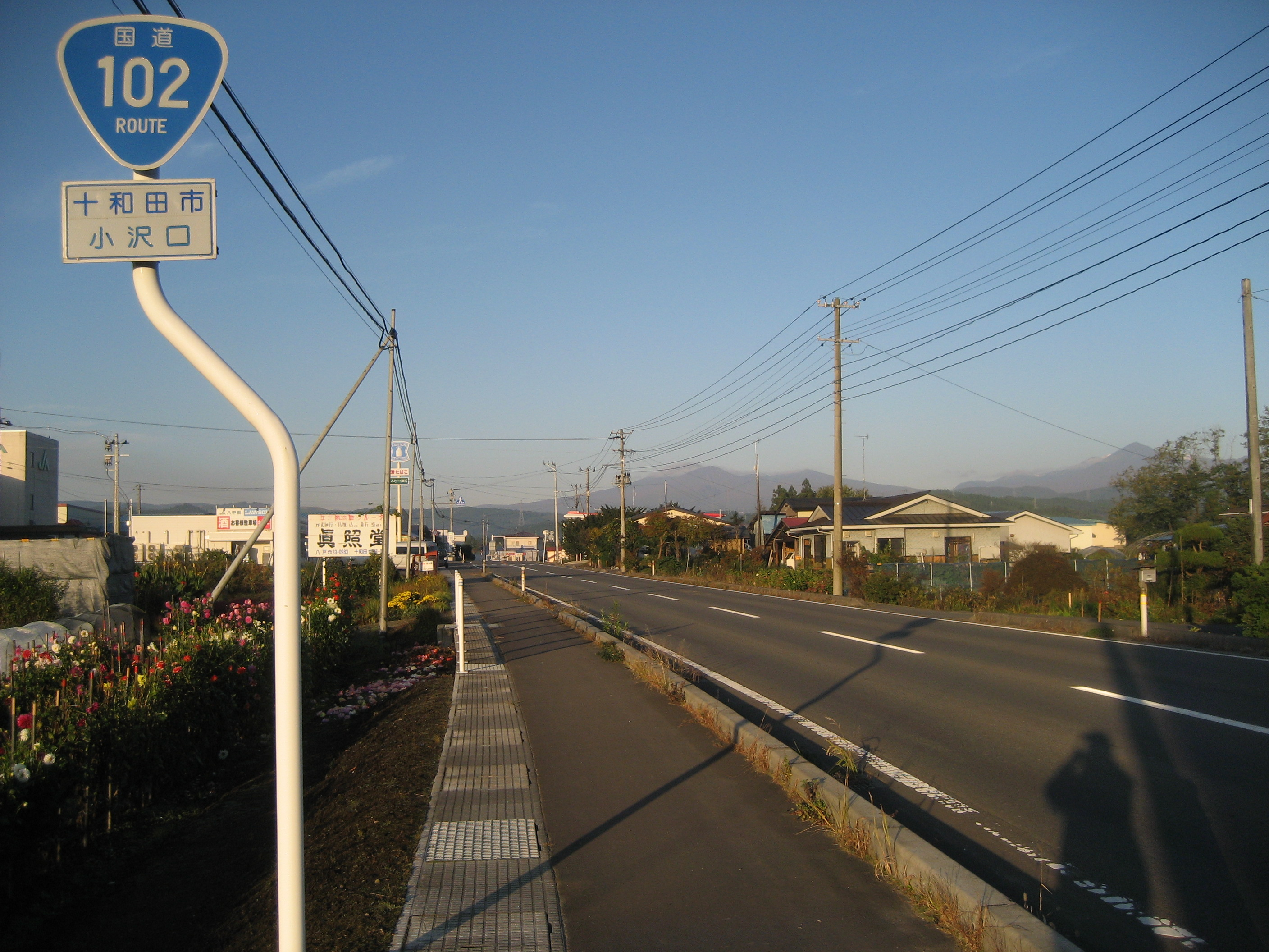 国道102号線青森県十和田市小沢口付近